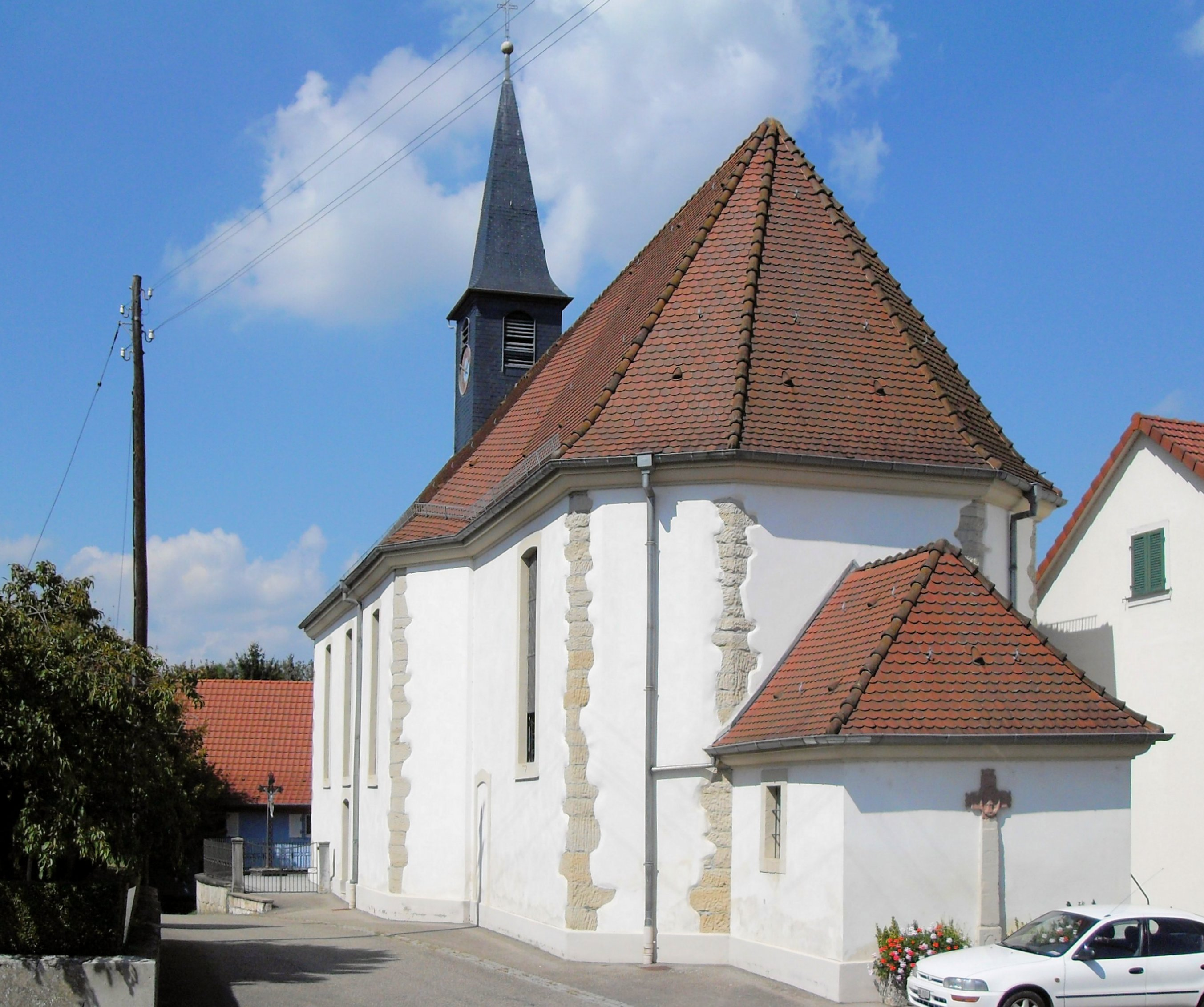 L'église Sainte-Marguerite à Neuwiller